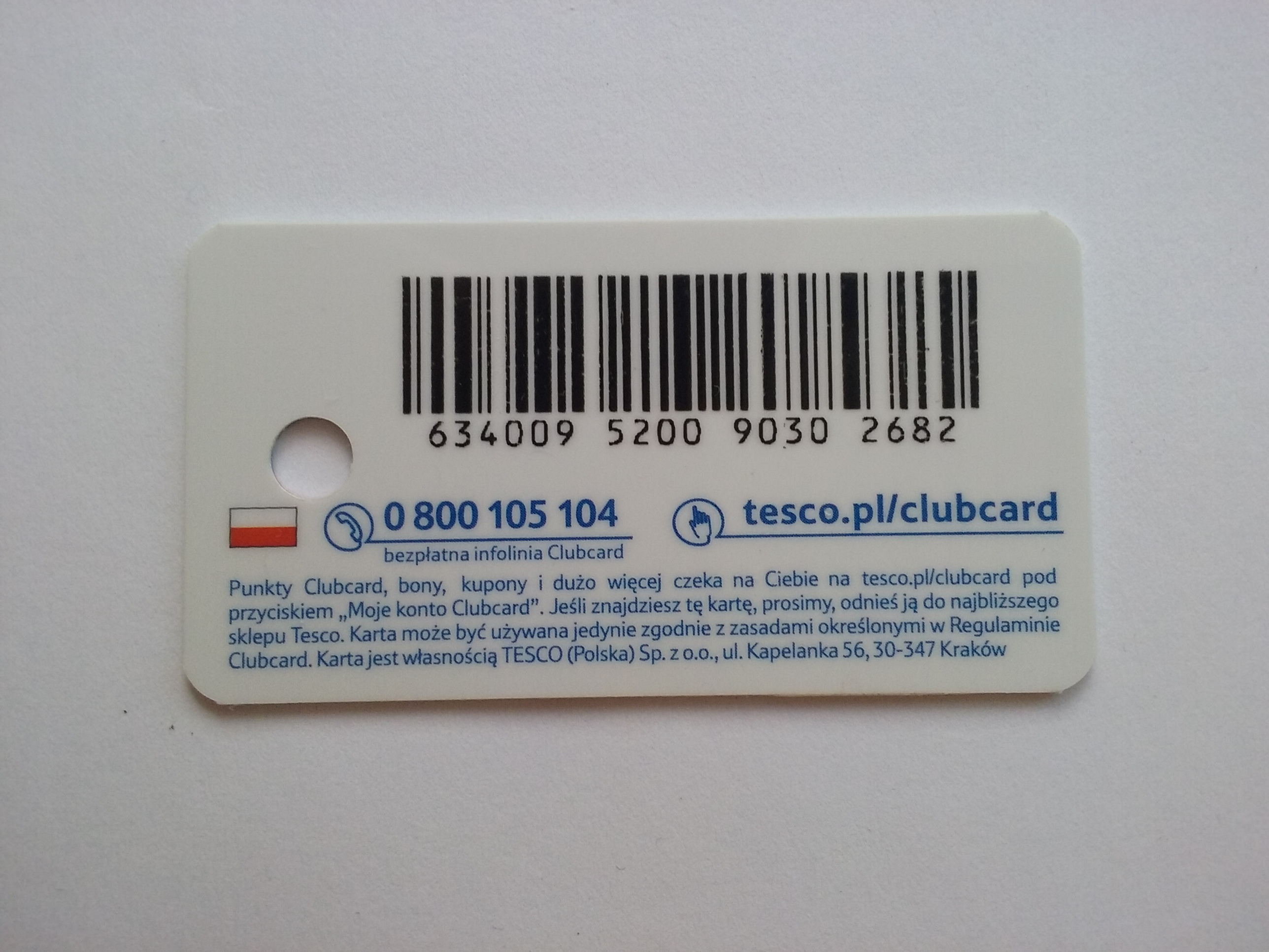 Karta Tesco ClubCard revers